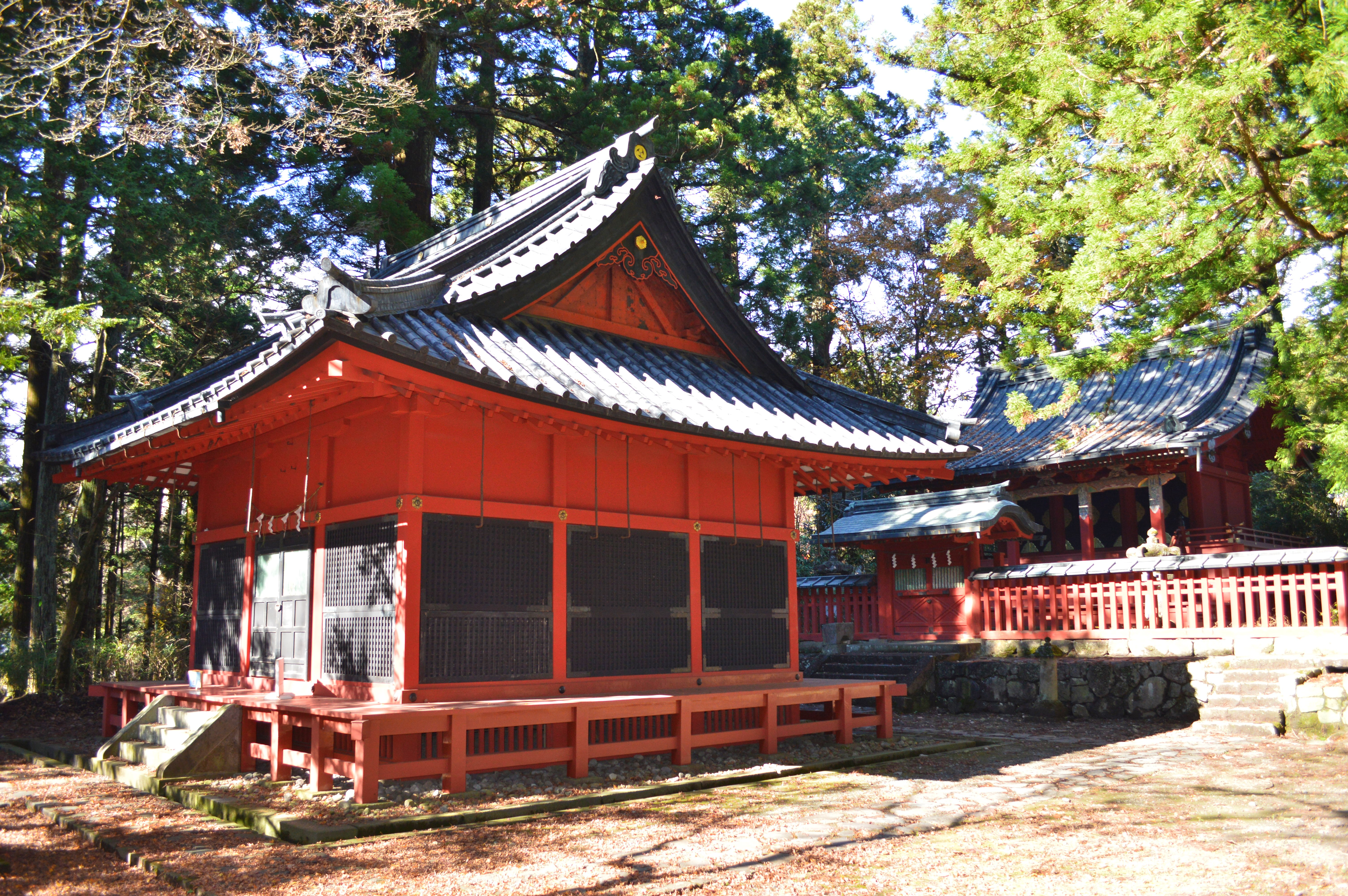 日光二荒山神社 別宮本宮神社 社殿